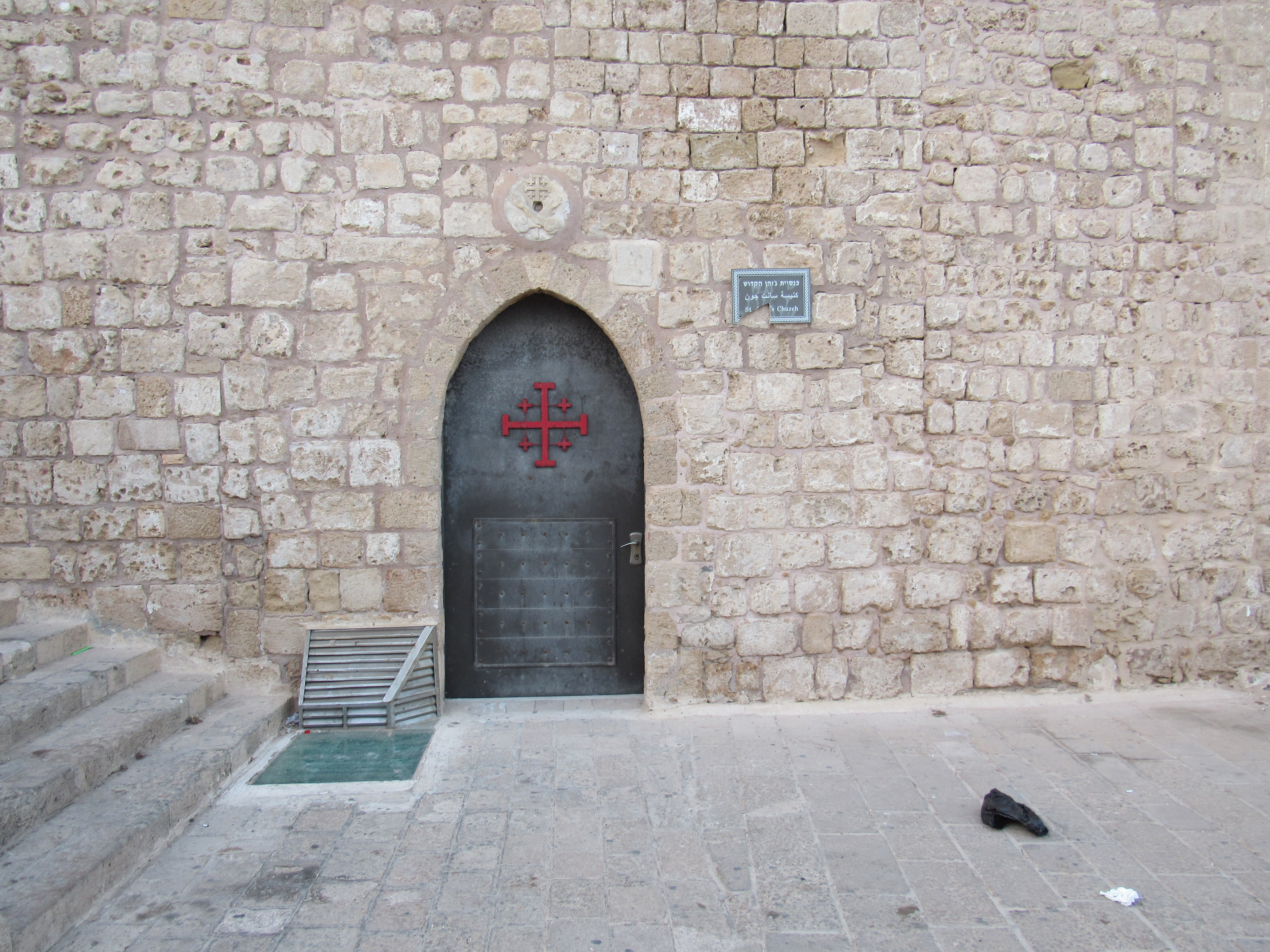 Acre